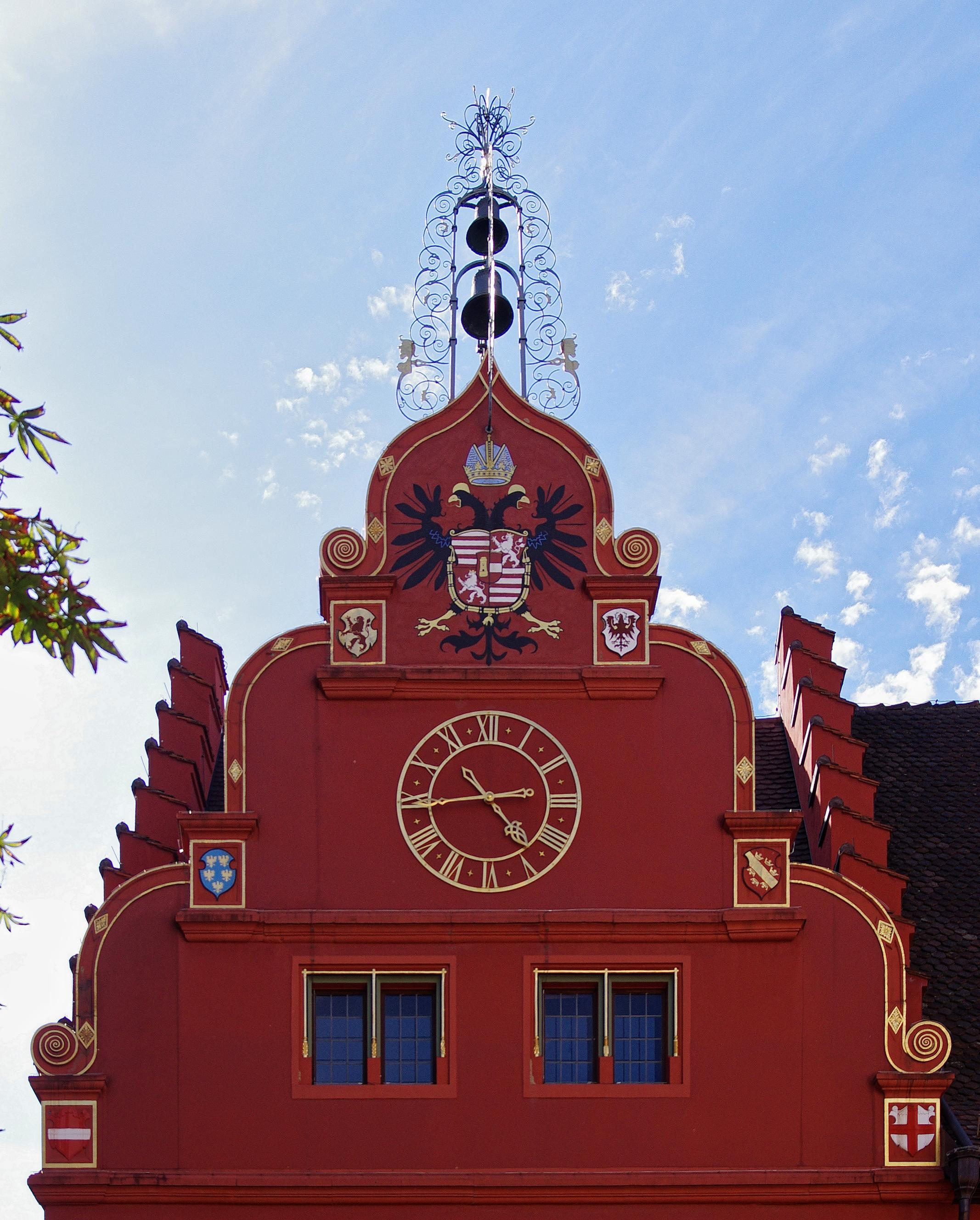 Die Uhr und der Schmück über der alten Hofeinfahrt. Heute ist hier der Haupteingan